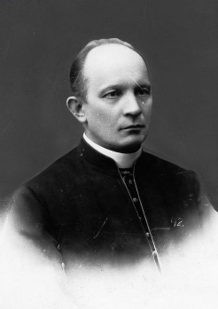 Biskup Władysław Krynicki